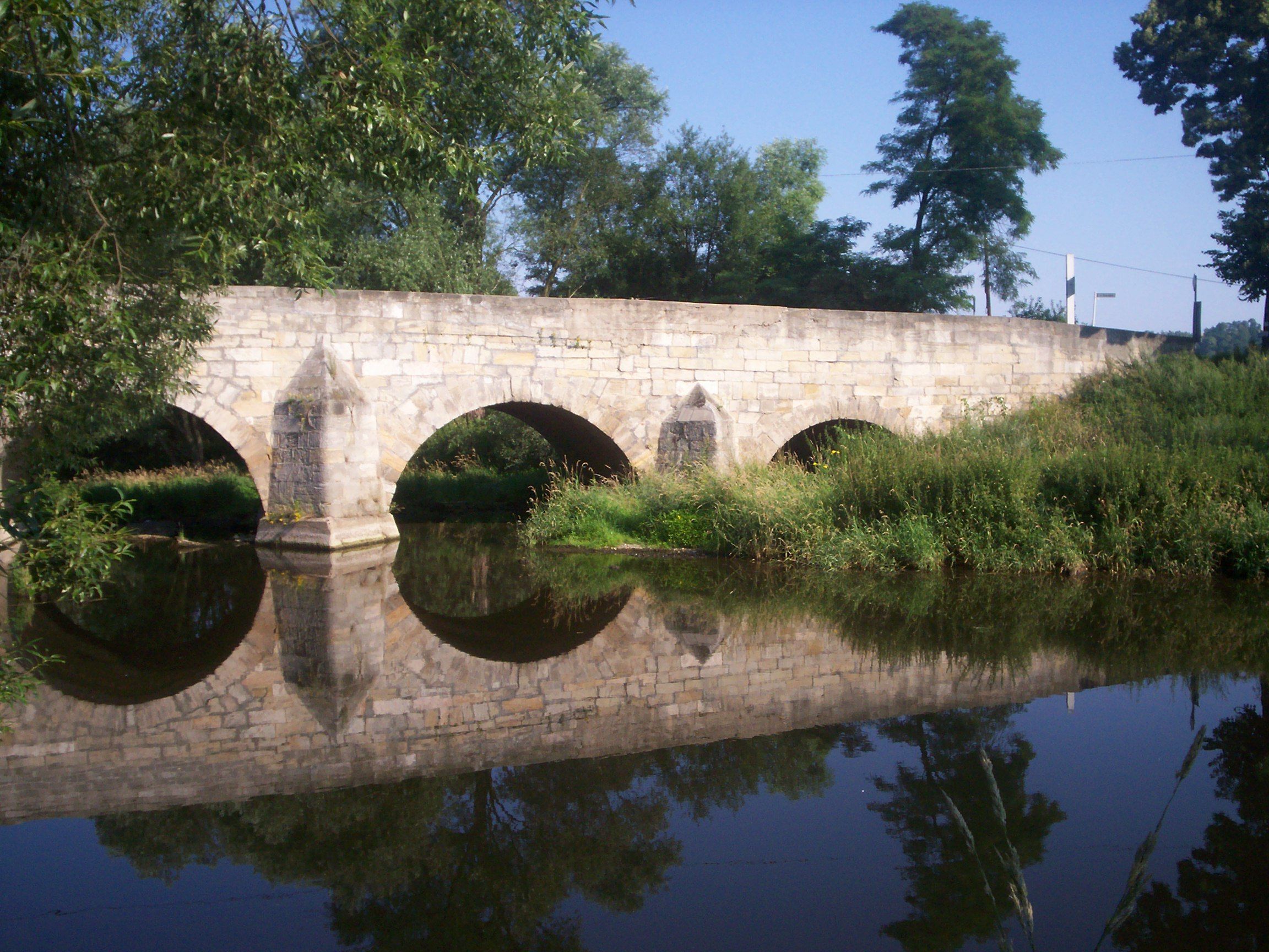 Lwówek Ślaski, most na Bobrze.